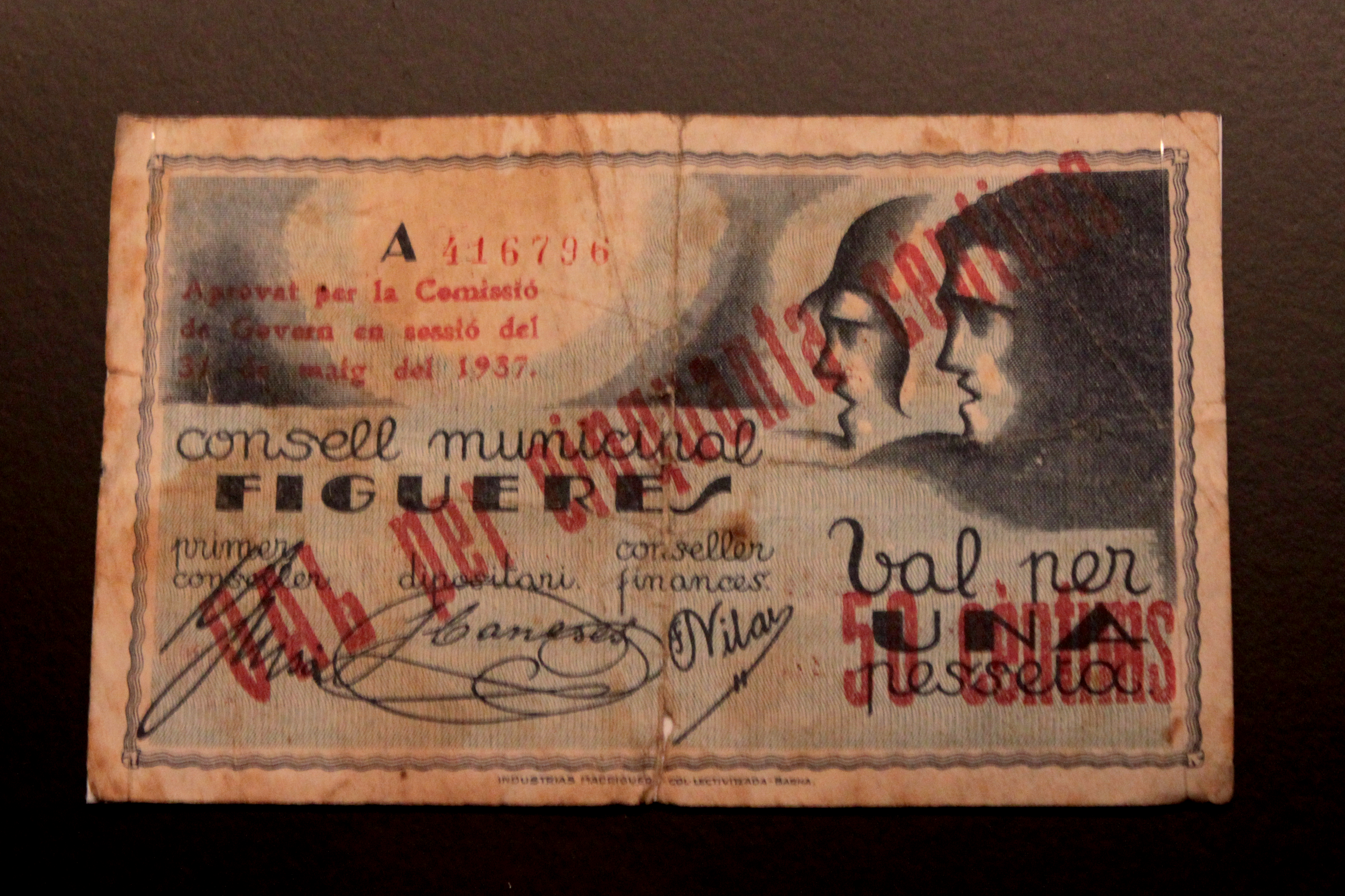 Billete de una peseta emitido por el Consell Municipal de Figueres durante la guerra civil, año 1937. Exposición Historia del dinero. Depositada en el Museo de Prehistoria de Valencia, Comunidad valenciana, España.